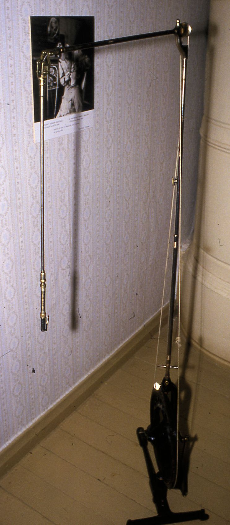 Vanha hammaspora